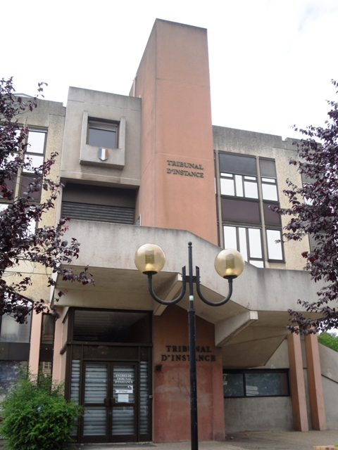 Le tribunal d'instance de Juvisy-sur-Orge (91)